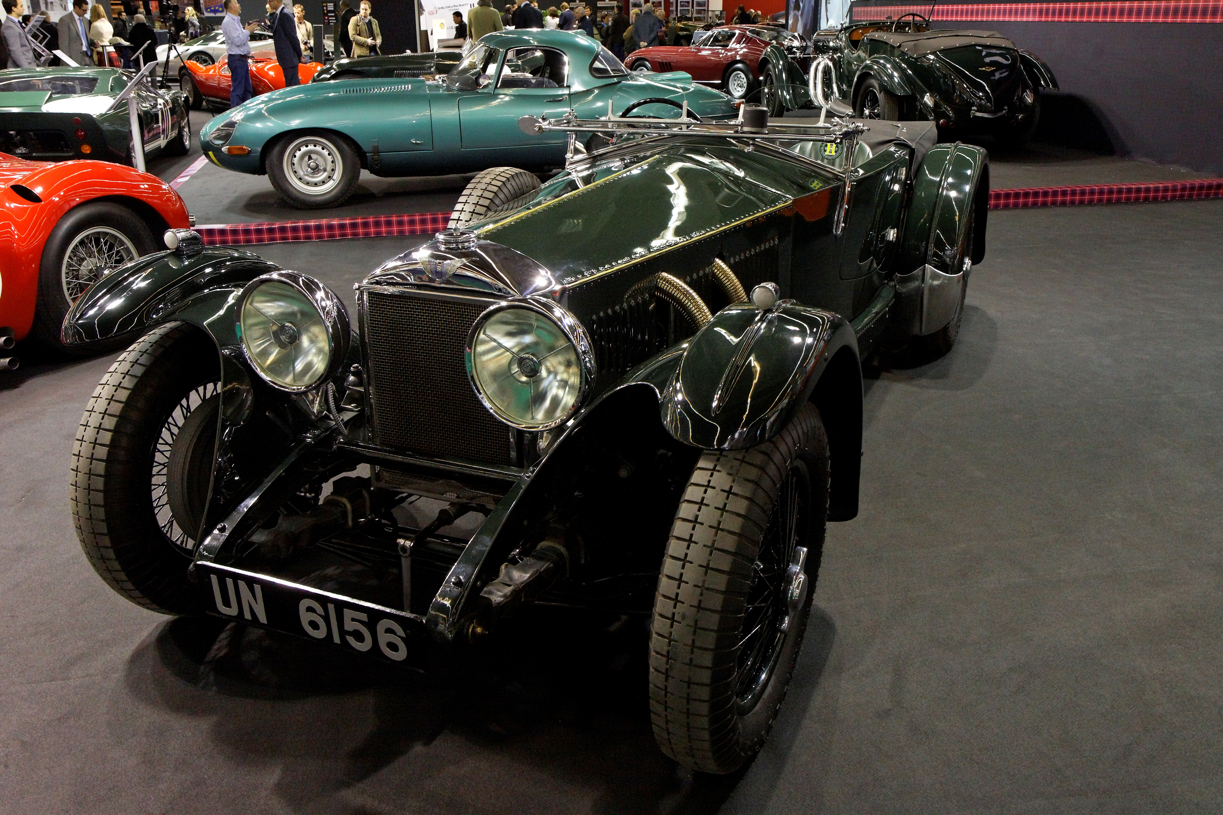 Photographie prise lors du salon rétromobile 2011 à Paris, porte de Versailles.